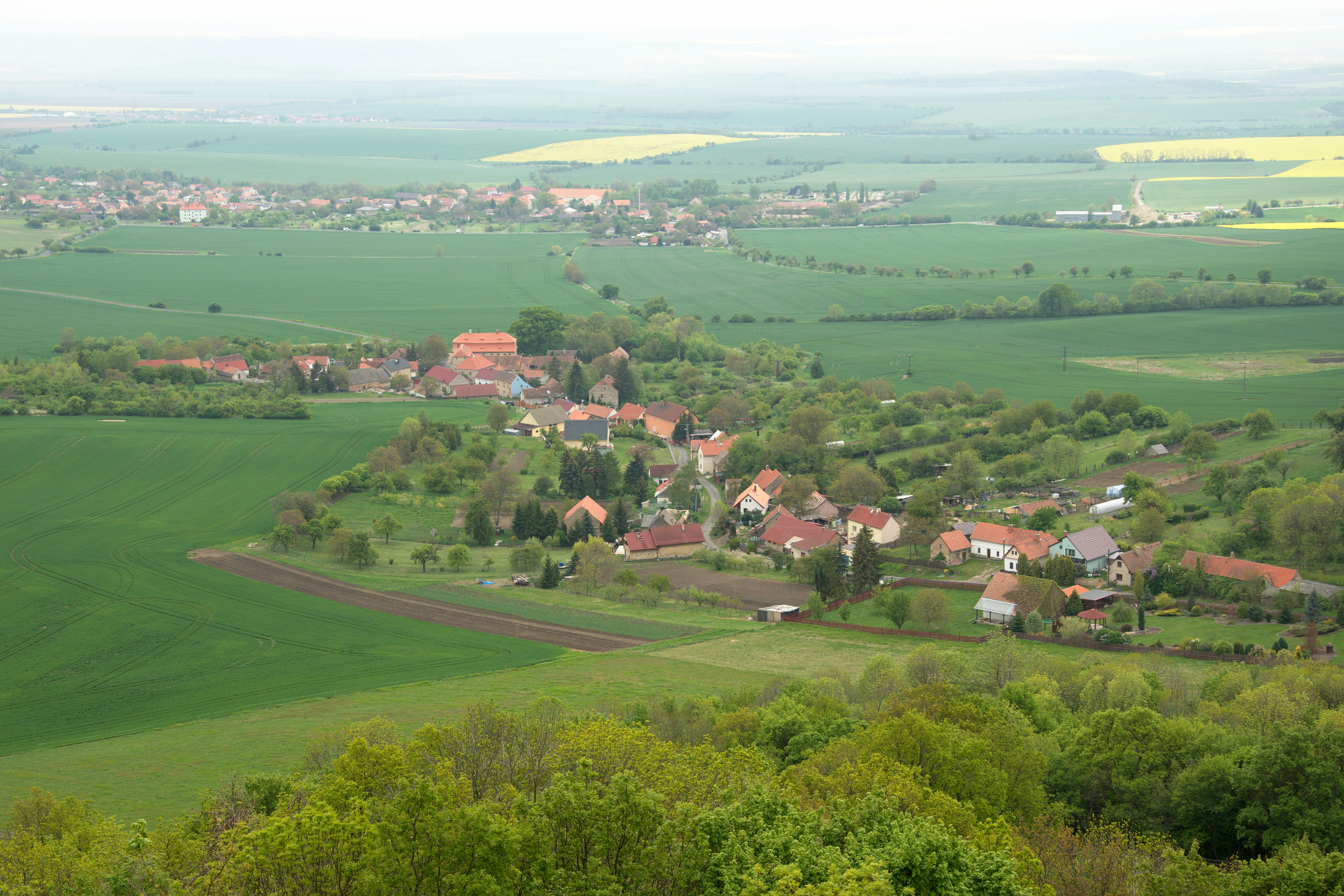 Pnětluky – pohled z Plešivce